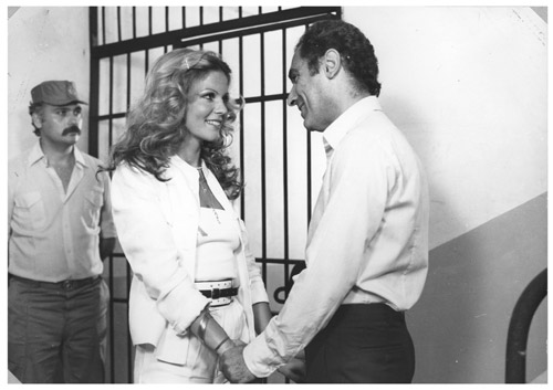 Fotografía blanco y negro sobre papel fotográfico brillante. En una cárcel aparecen en primer plano Graciela Alfano y Juan Carlos Calabró de pie y de medio cuerpo, tomados de las manos, mirándose y sonriendo. Detrás un policía y las rejas del calabozo.